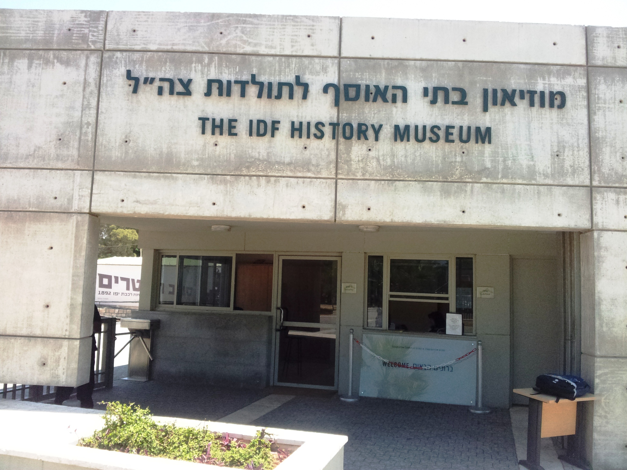 השער למוזיאון בית האוסף - צה"ל, תל אביב